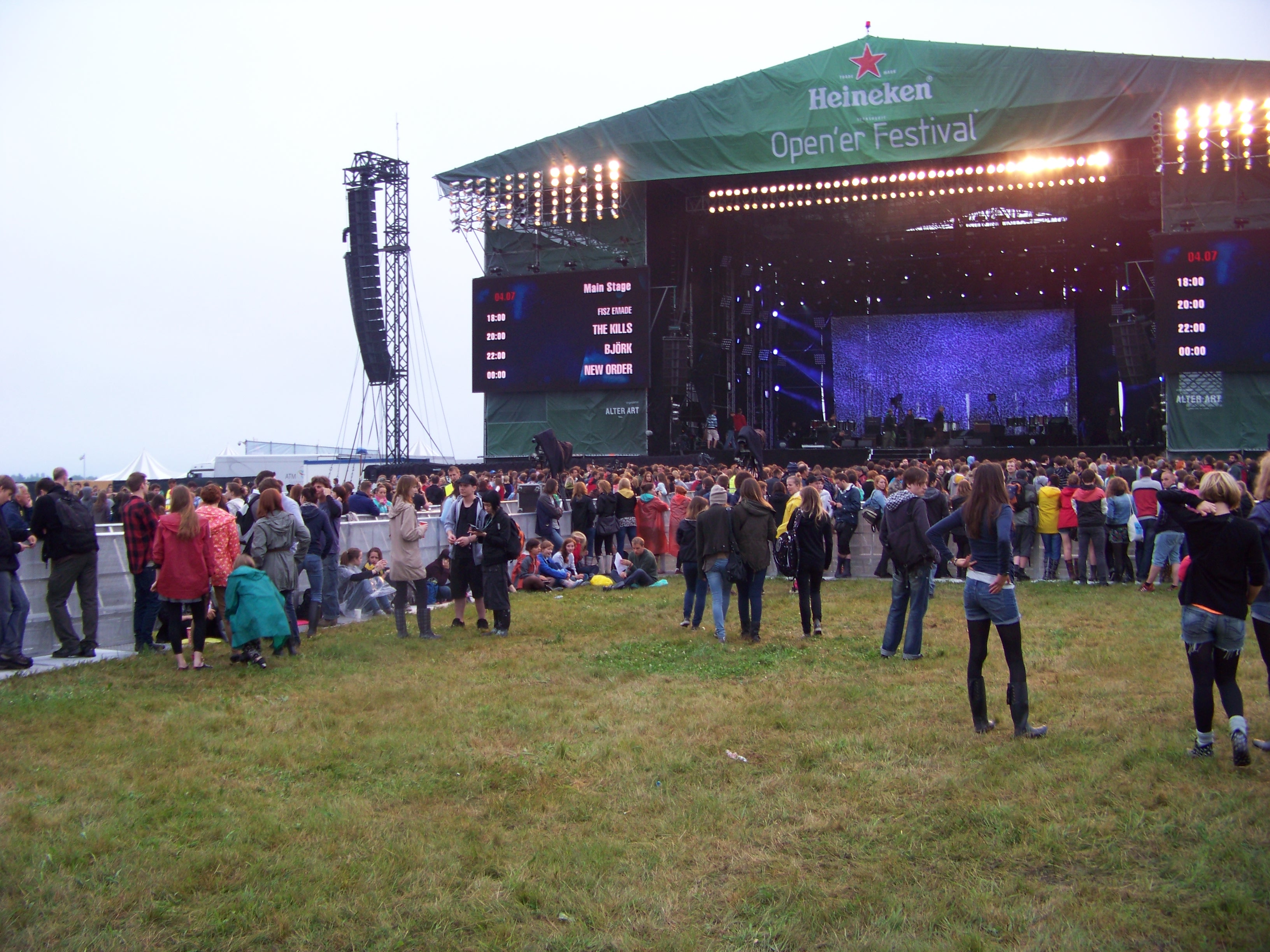 Stowarzyszenie Wikimedia Polska w strefie NGO na Open'er Festivalu 2012.